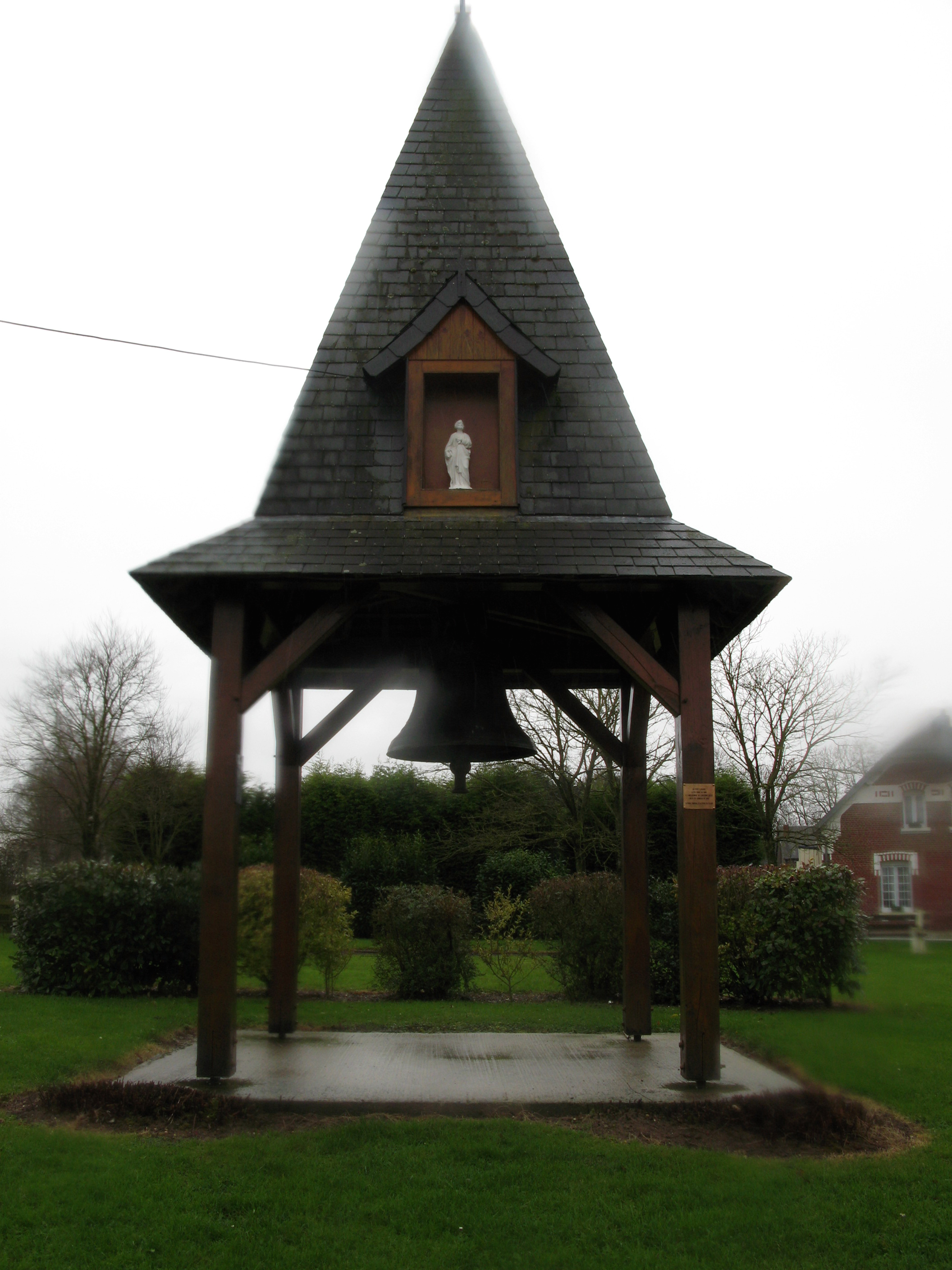 Gueudecourt (Somme, France) - Le petit clocher, édifié à l'emplacement de l'ancienne église. La photo a été prise sous la pluie, ce qui explique le flou sur de nombreuses zones de l'image, dû aux gouttes sur l'objectif.